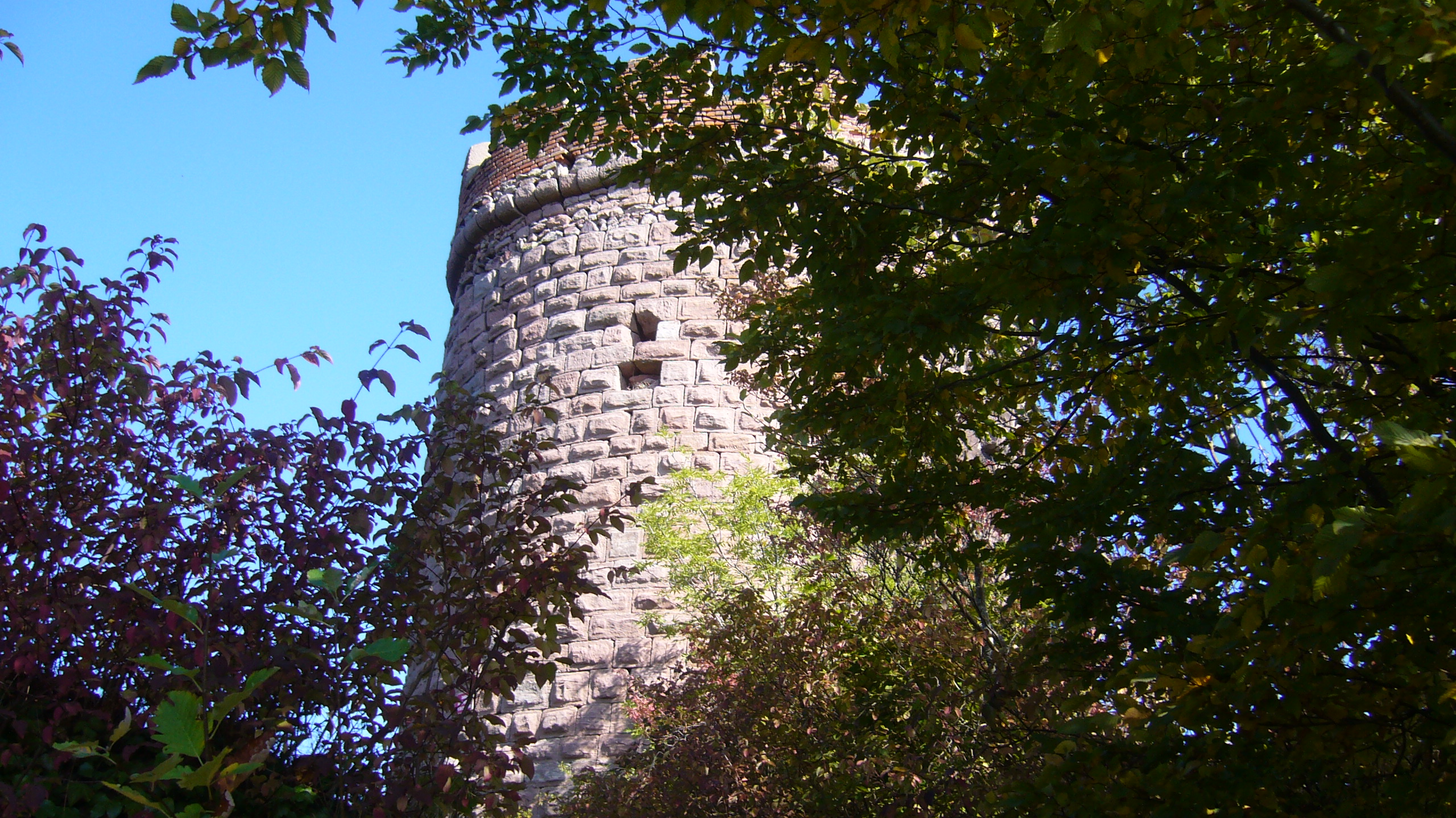 Donjon circulaire du Haut-Ribeaupierre